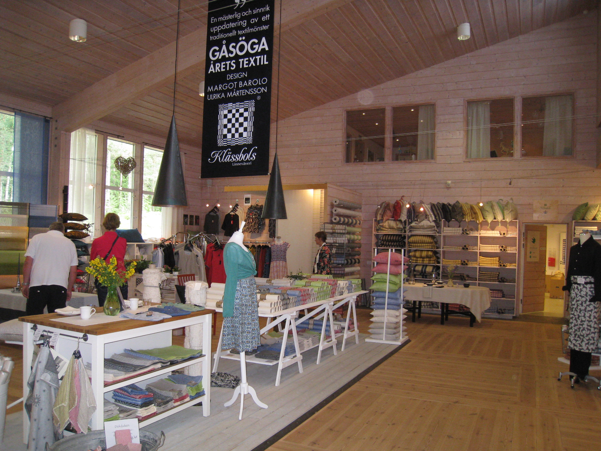 Klässbols Linneväveri, interiör i butiken, Klässbol i Arvika kommun, Värmland.